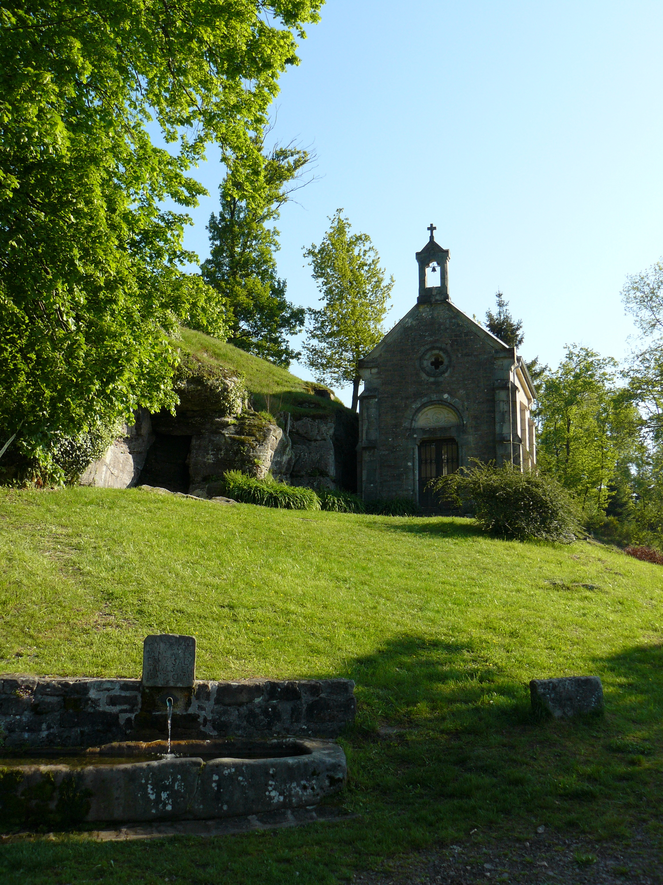 Grotte, source et chapelle de Saint-Colomban, à Sainte-Marie-en-Chanois (Haute-Saône, France)